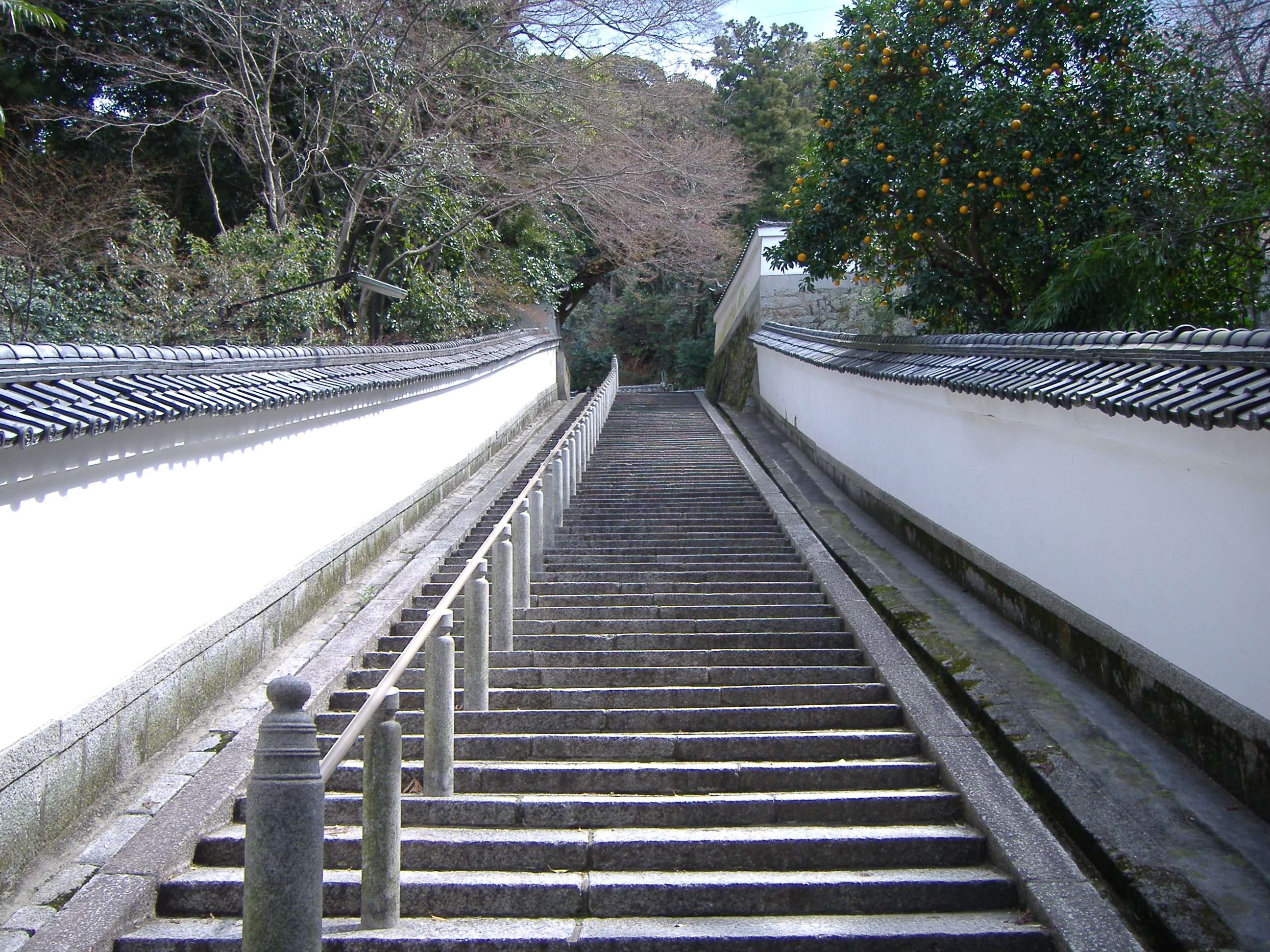 知恩院（京都市東山区） 勢至堂・法然上人御廟参道